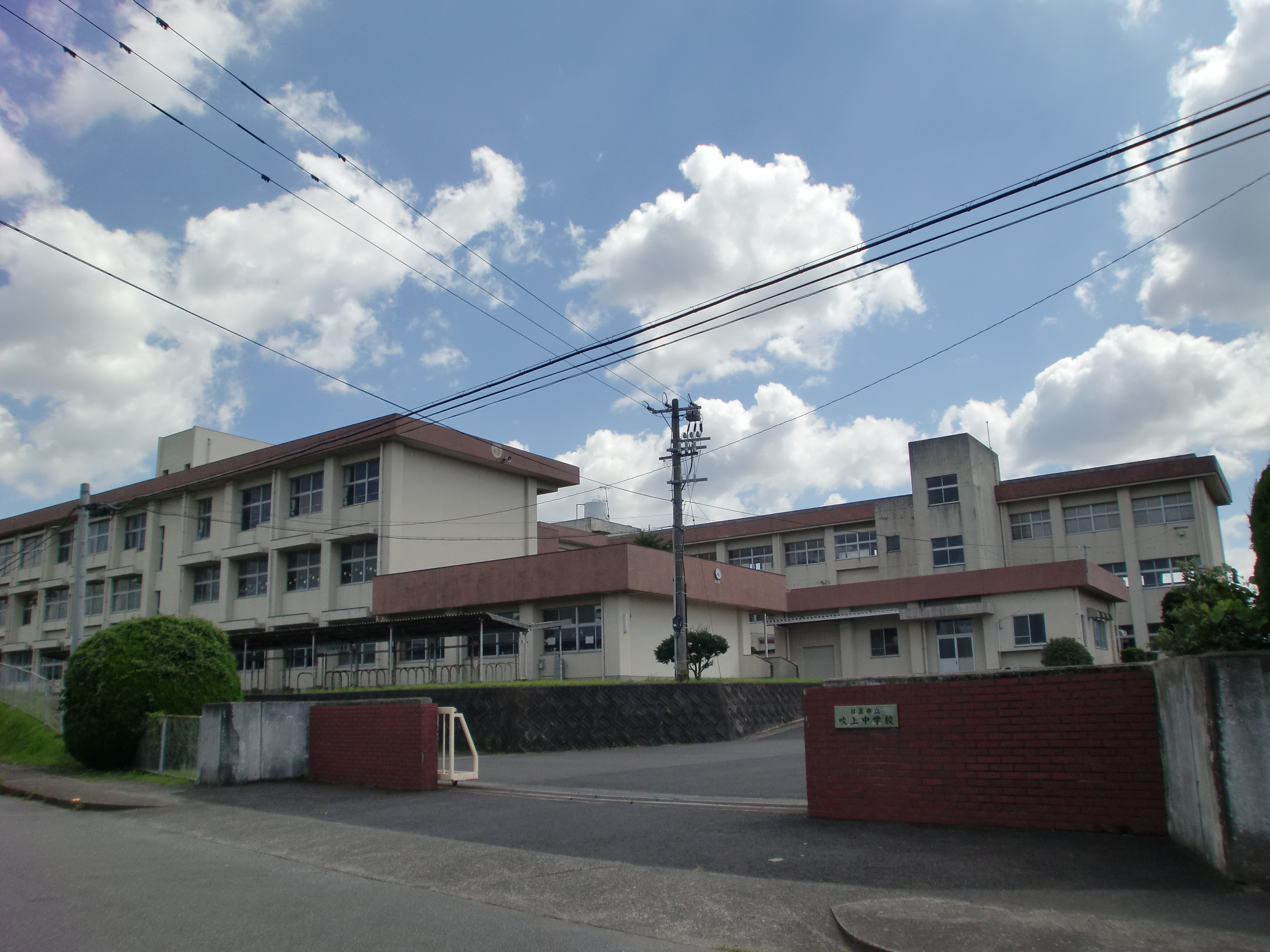 日置市立吹上中学校の外観。